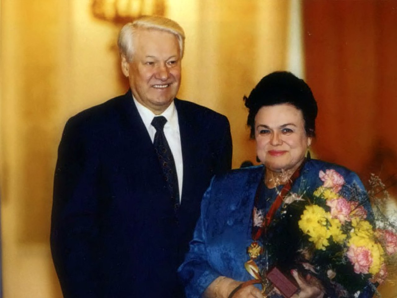 МОСКВА, КРЕМЛЬ. Церемония вручения государственных наград. Орден "За заслуги перед Отечеством" III степени вручен певице Людмиле Георгиевне Зыкиной